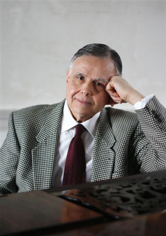 Portrait de Laurent Martin